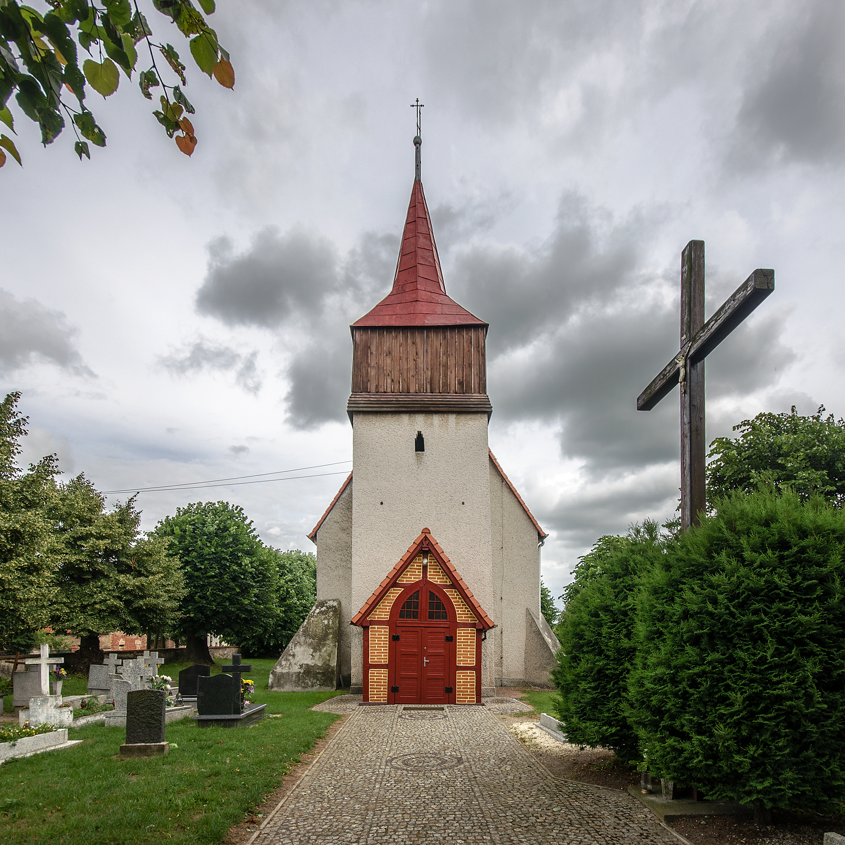 Kłębanowice, kościół fil. p.w. św. Jadwigi, XV, XVIII